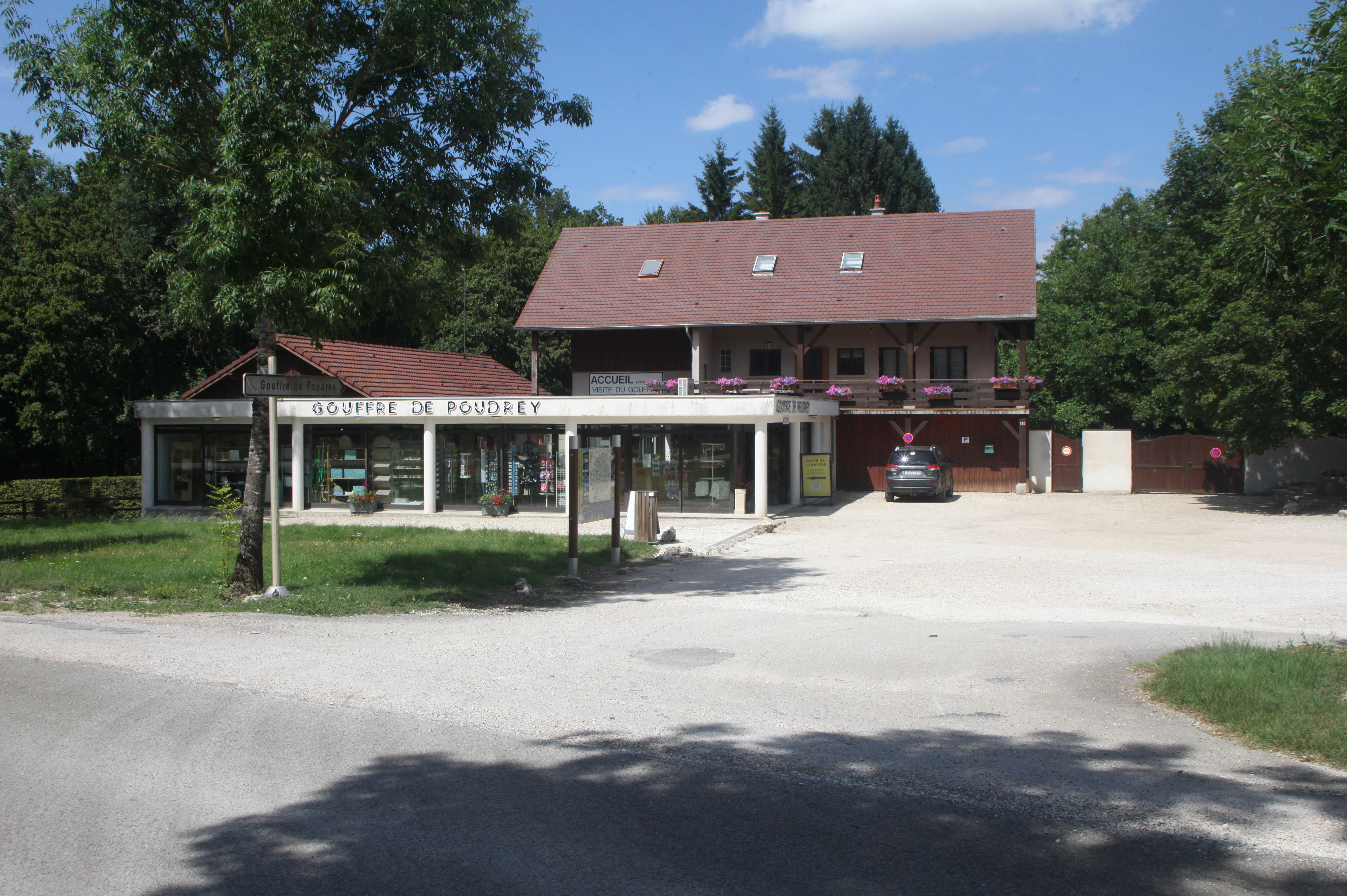 Entrée du gouffre de Poudrey (Doubs).